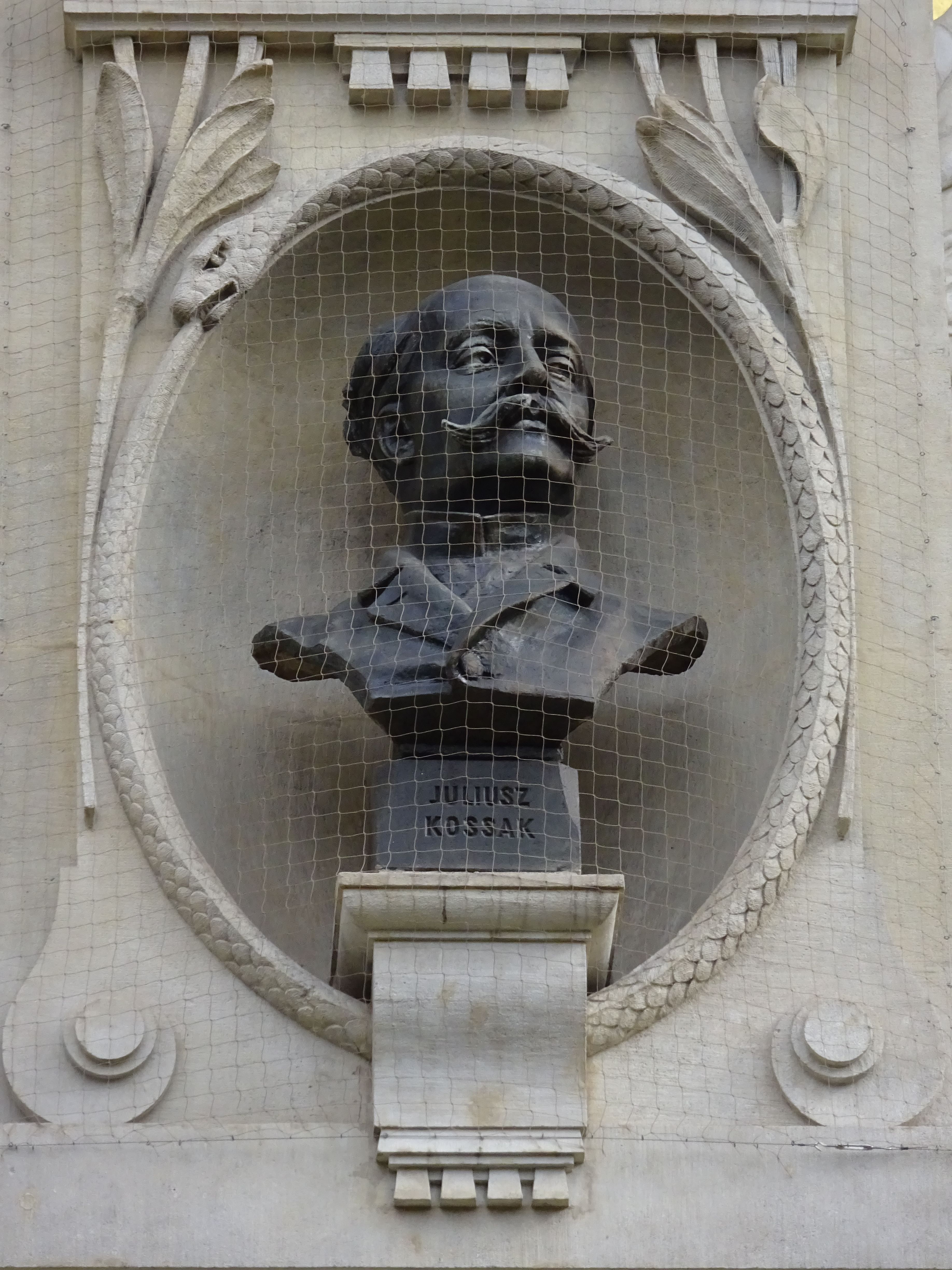 Popiersie Juliusza Kossaka na zachodniej elewacji Pałacu Sztuki w Krakowie. 2016